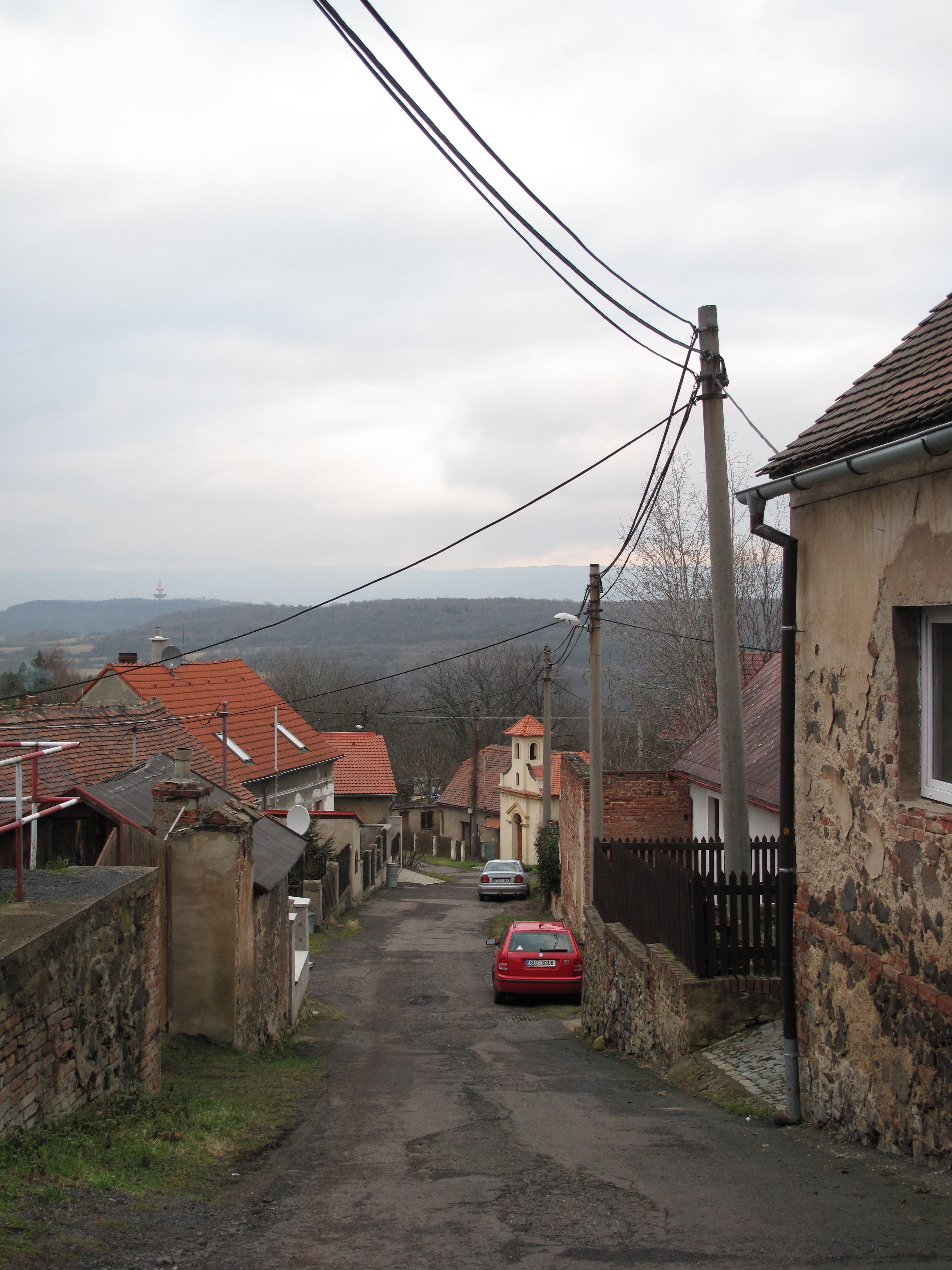 Silnice v Úpoři. Okres Teplice, Česká republika.